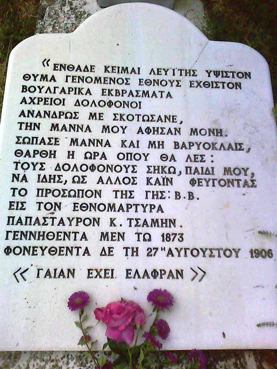 Η επιτύμβια πλάκα - δωρεά του Ελληνικού Προξενείου Μοναστηρίου